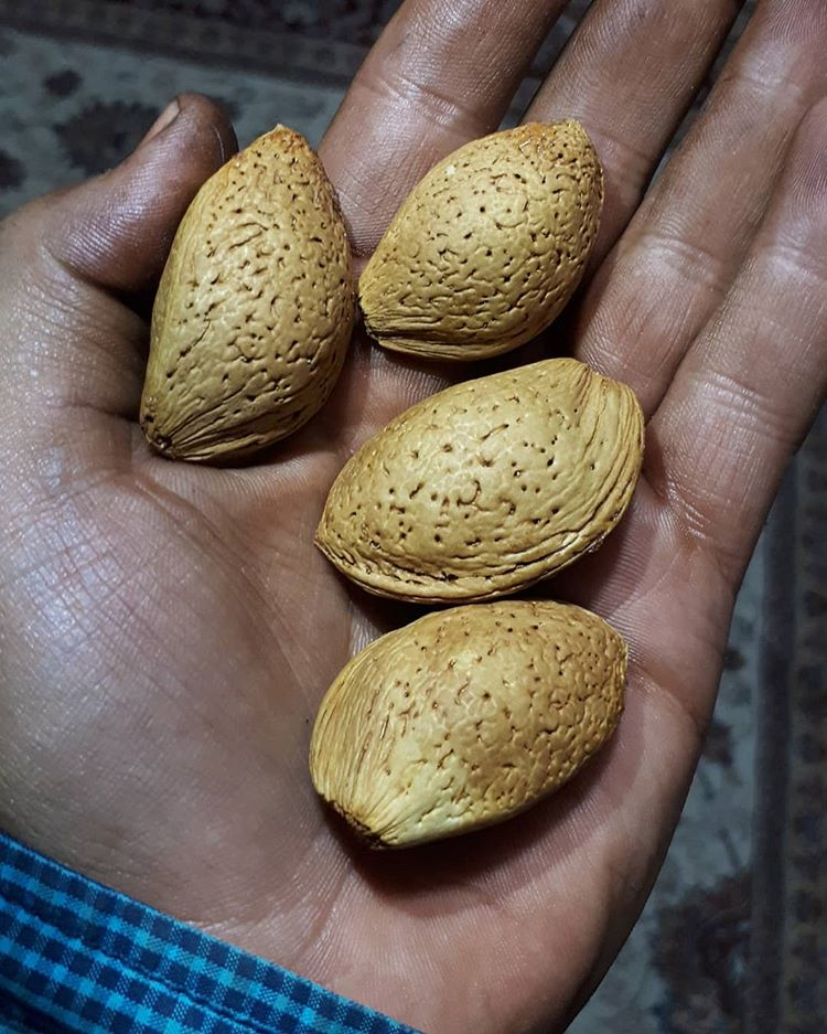 بادام سنگی تویسرکان